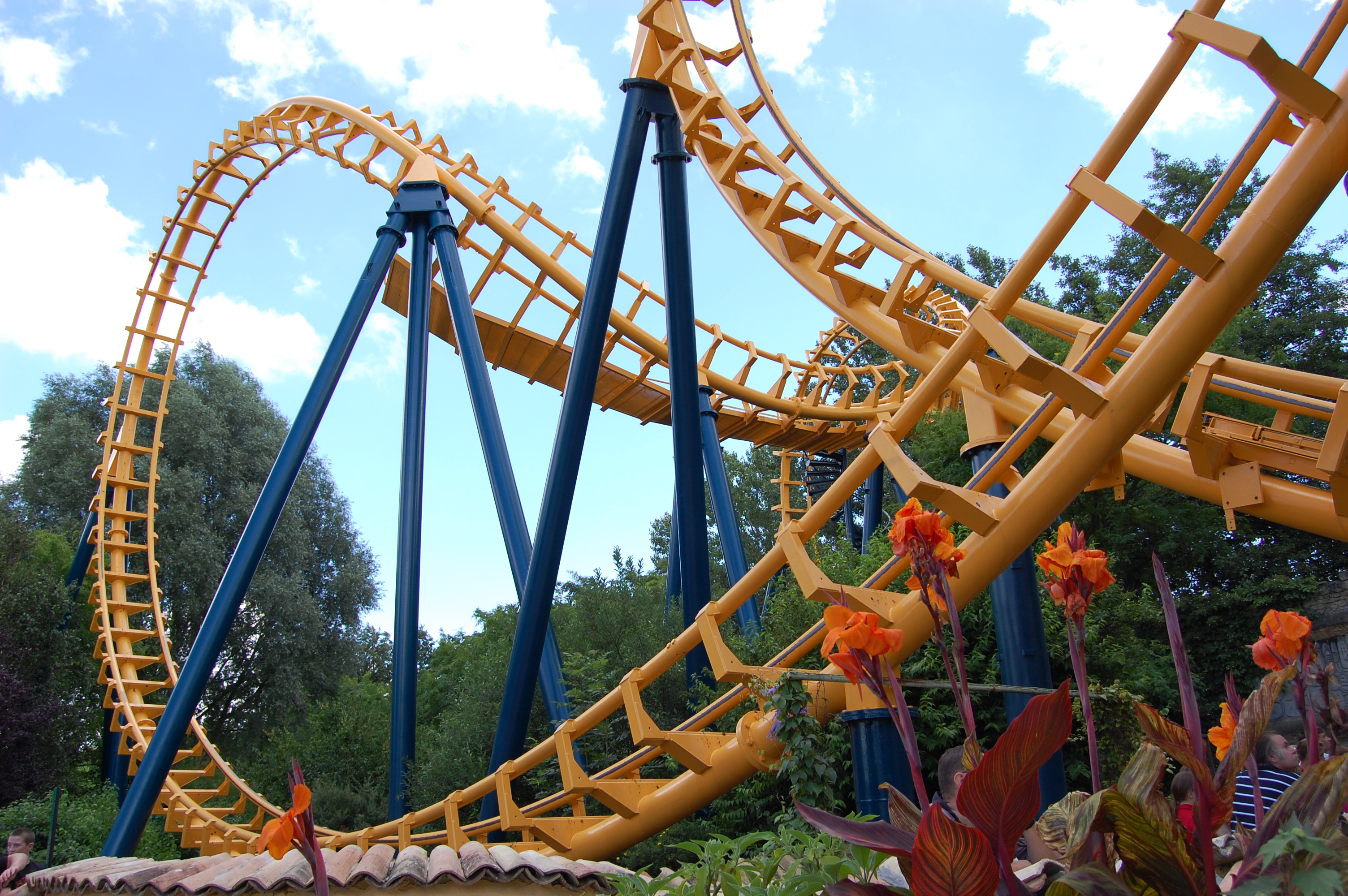 Vekoma Boomerang roller coaster at Bellewaerde in Belgium